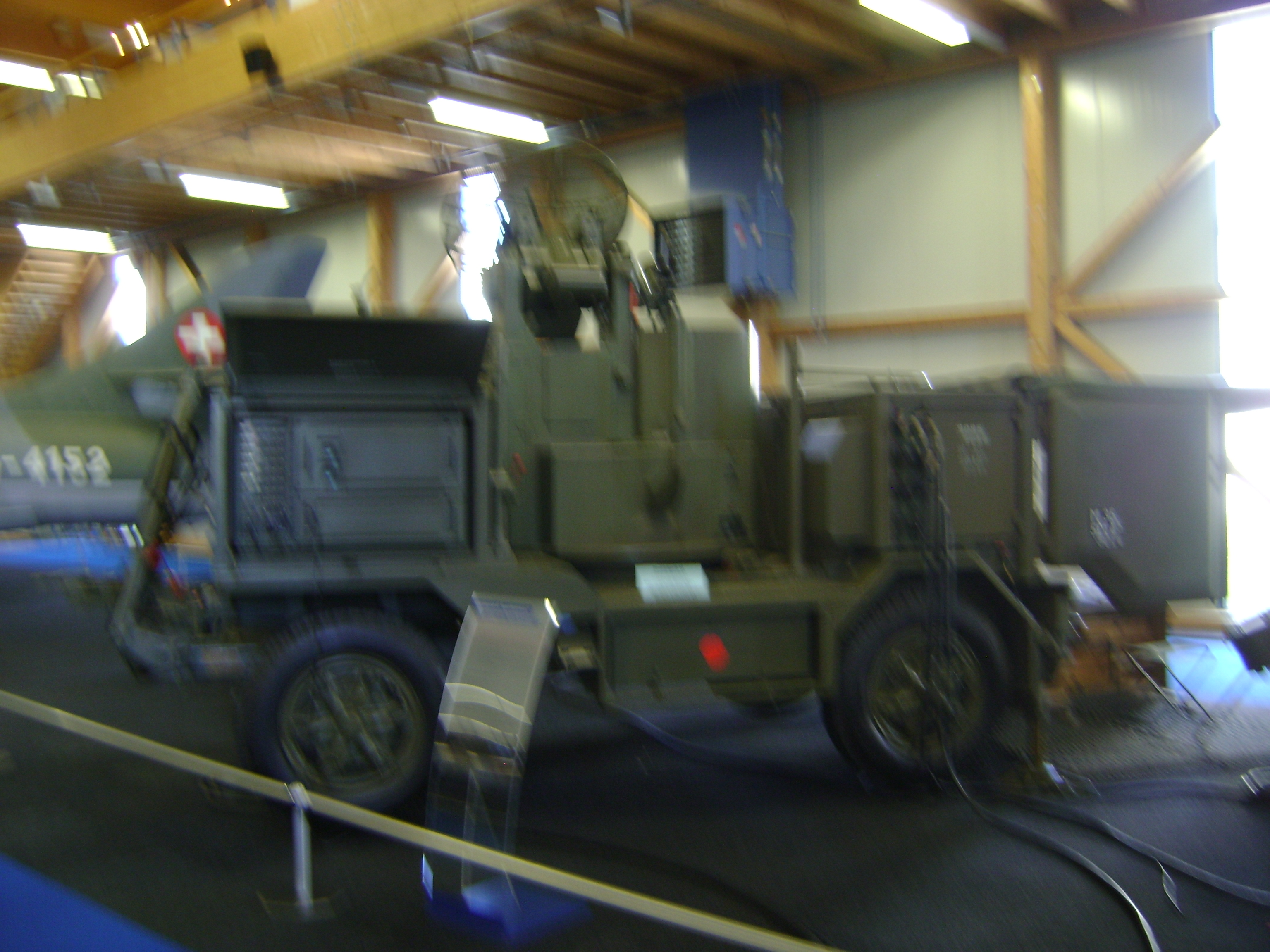 Superfledermaus2